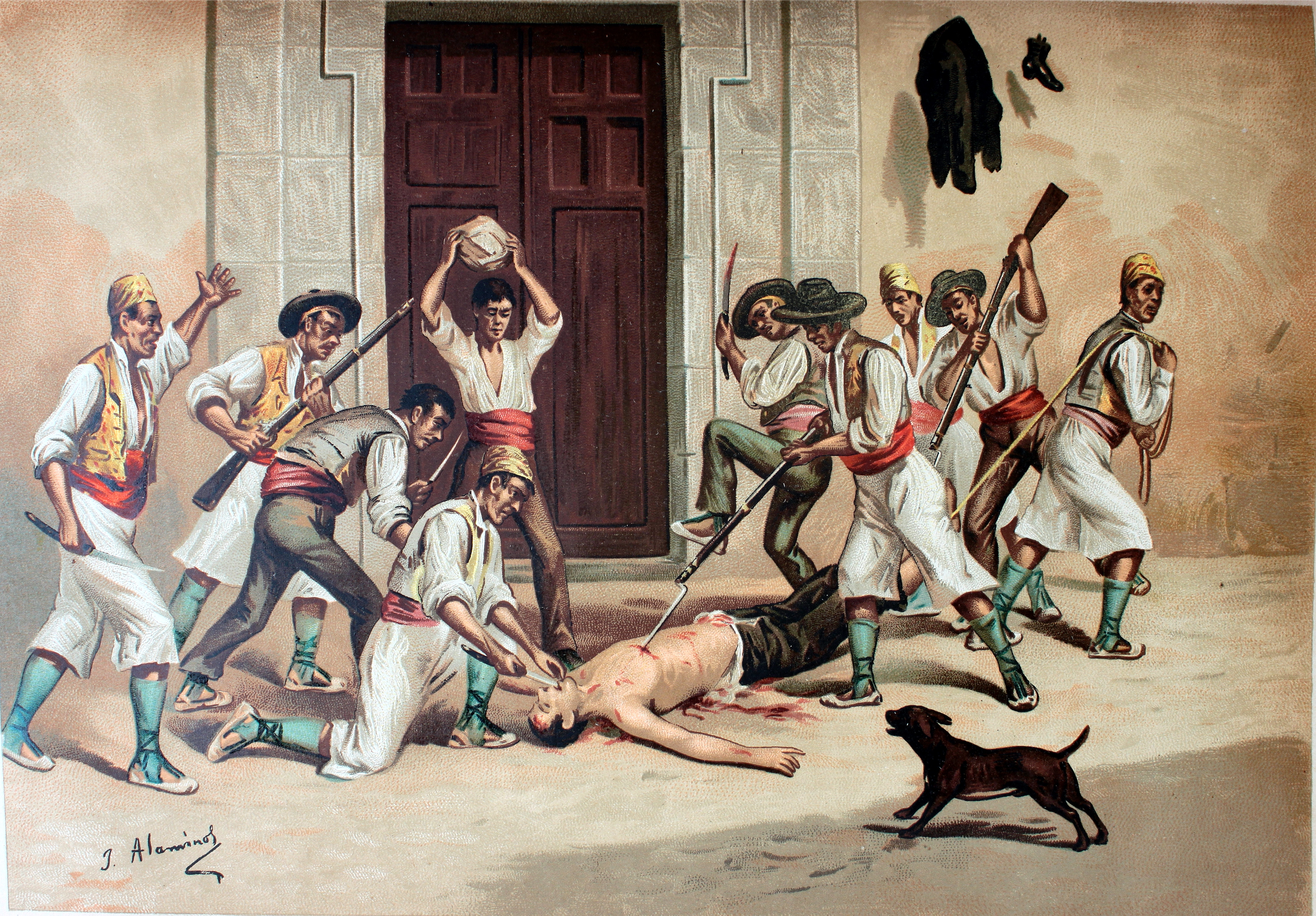 "Muerte del Alcalde de Alcoy D. Agustín Albors". Ilustraciones de la obra : Historia contemporánea. Segunda parte de la Guerra Civil : anales desde 1843 hasta el fallecimiento de don Alfonso XII / por Antonio Pirala. - Madrid : Felipe González Rojas, 1893-1895